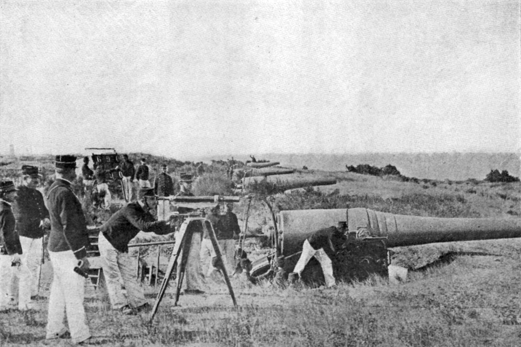 Batería de Jamblet.—Cañones de 24 cm.